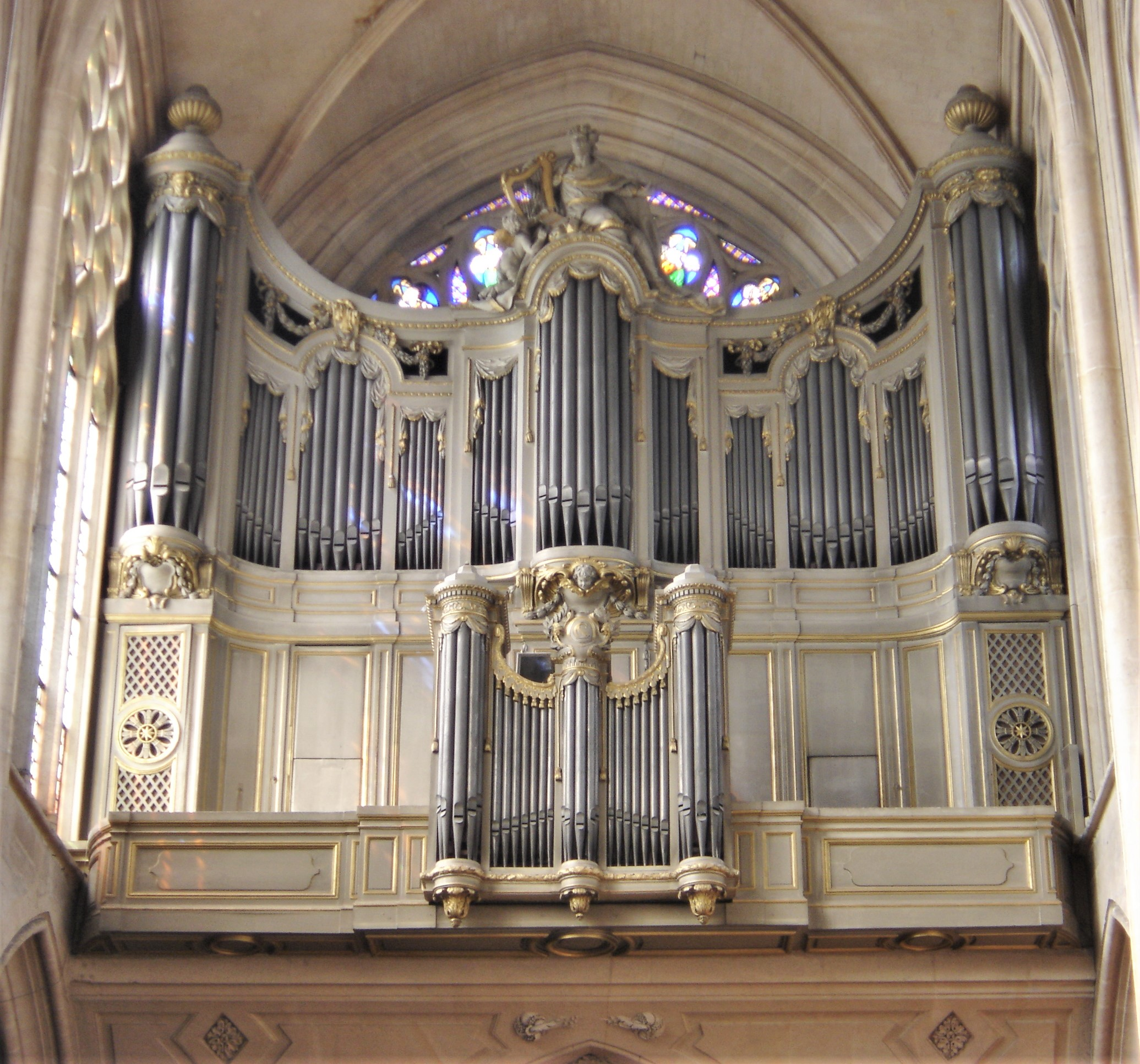 Orgue de l'église Saint Germain l'Auxerrois - Paris